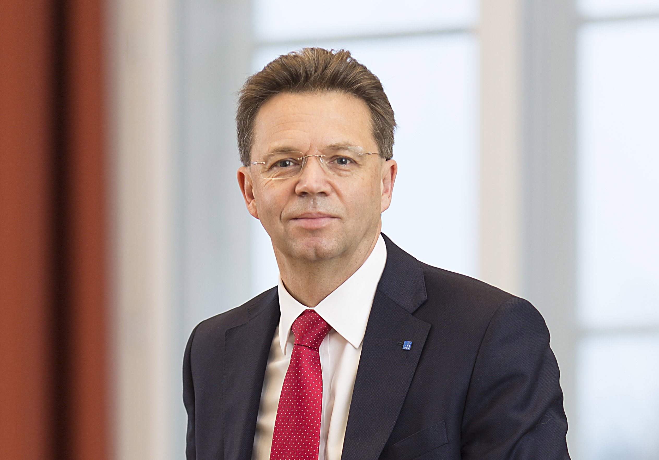 Volker Epping im Senatssaal der Leibniz Universität Hannover